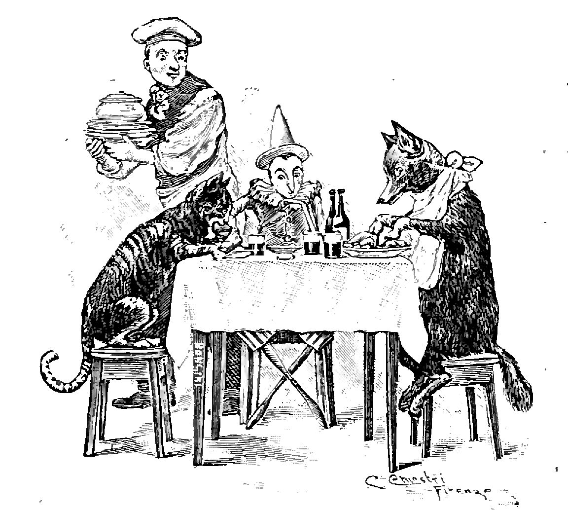 Illustrations from "Le avventure di Pinocchio, storia di un burattino", Carlo Collodi, Bemporad & figlio, Firenze 1902 (Drawings and engravings by Carlo Chiostri, and A. Bongini)